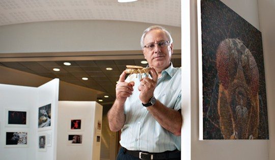 פרופסור לחקר ההתפתחות העוברית בן ציון שילה